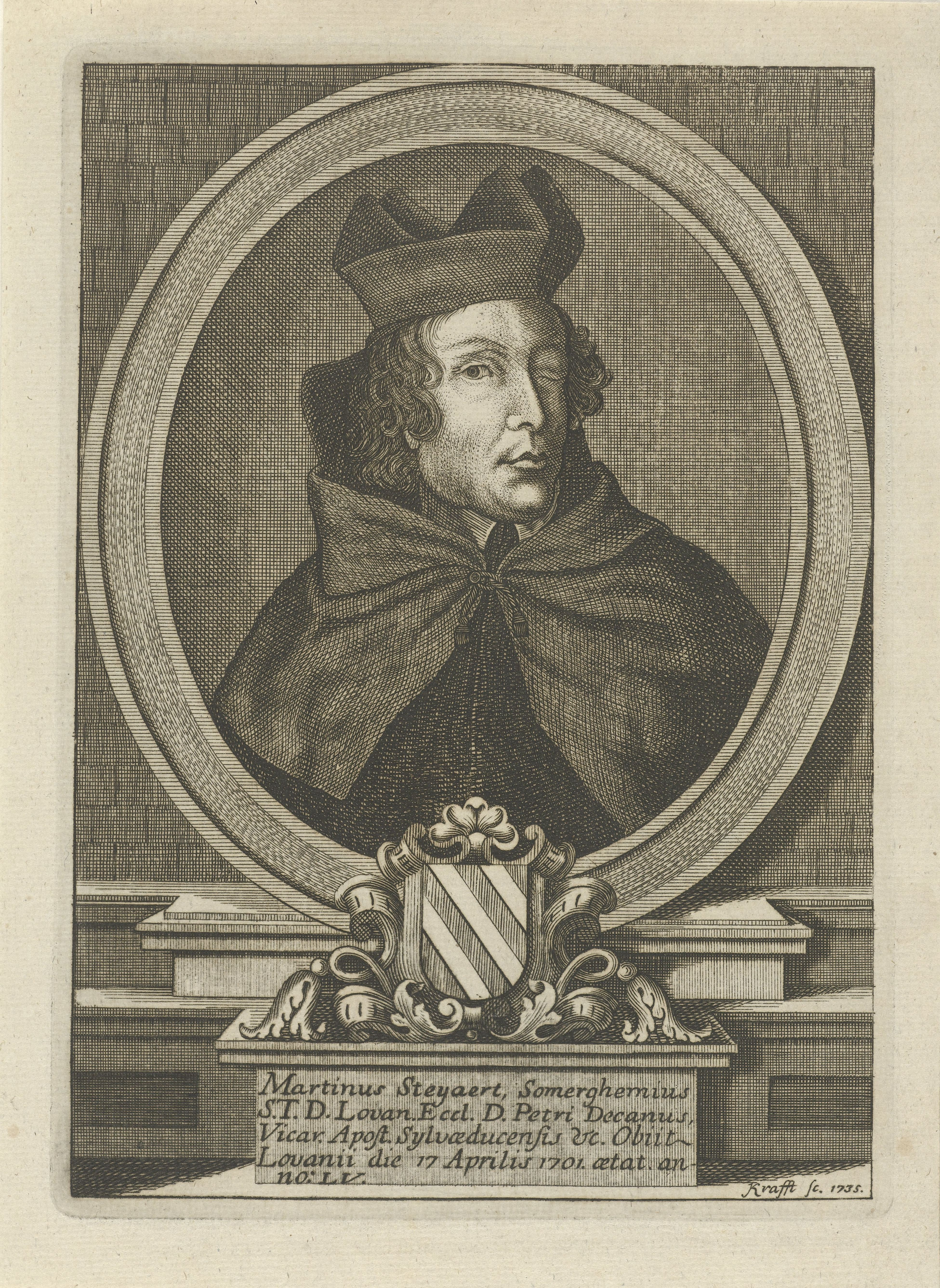 Portretbuste van de theoloog Martinus Steyaert. Hij heeft zijn linkeroog gesloten. Onder het portret een wapen en een plint met zijn naam, titel en levensdata.